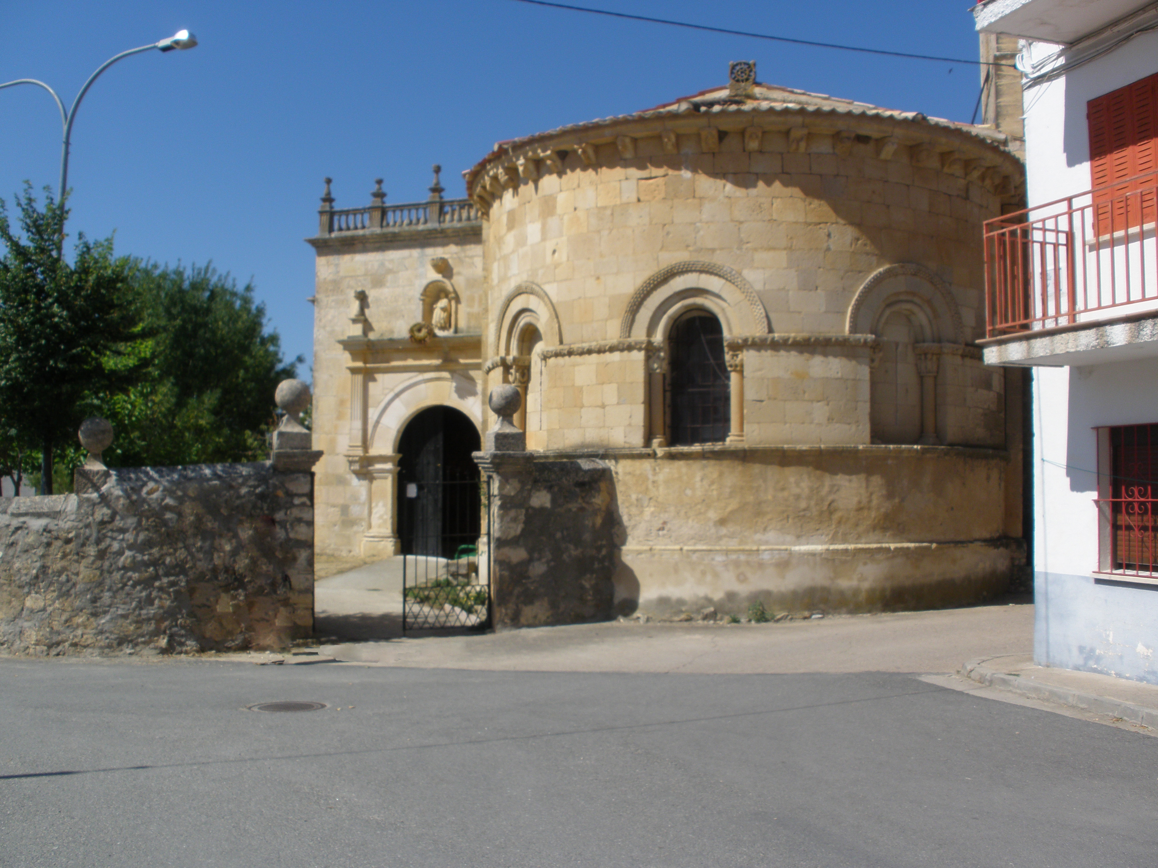 Iglesia de San Juan en la localidad segoviana de Cerezo de Arriba